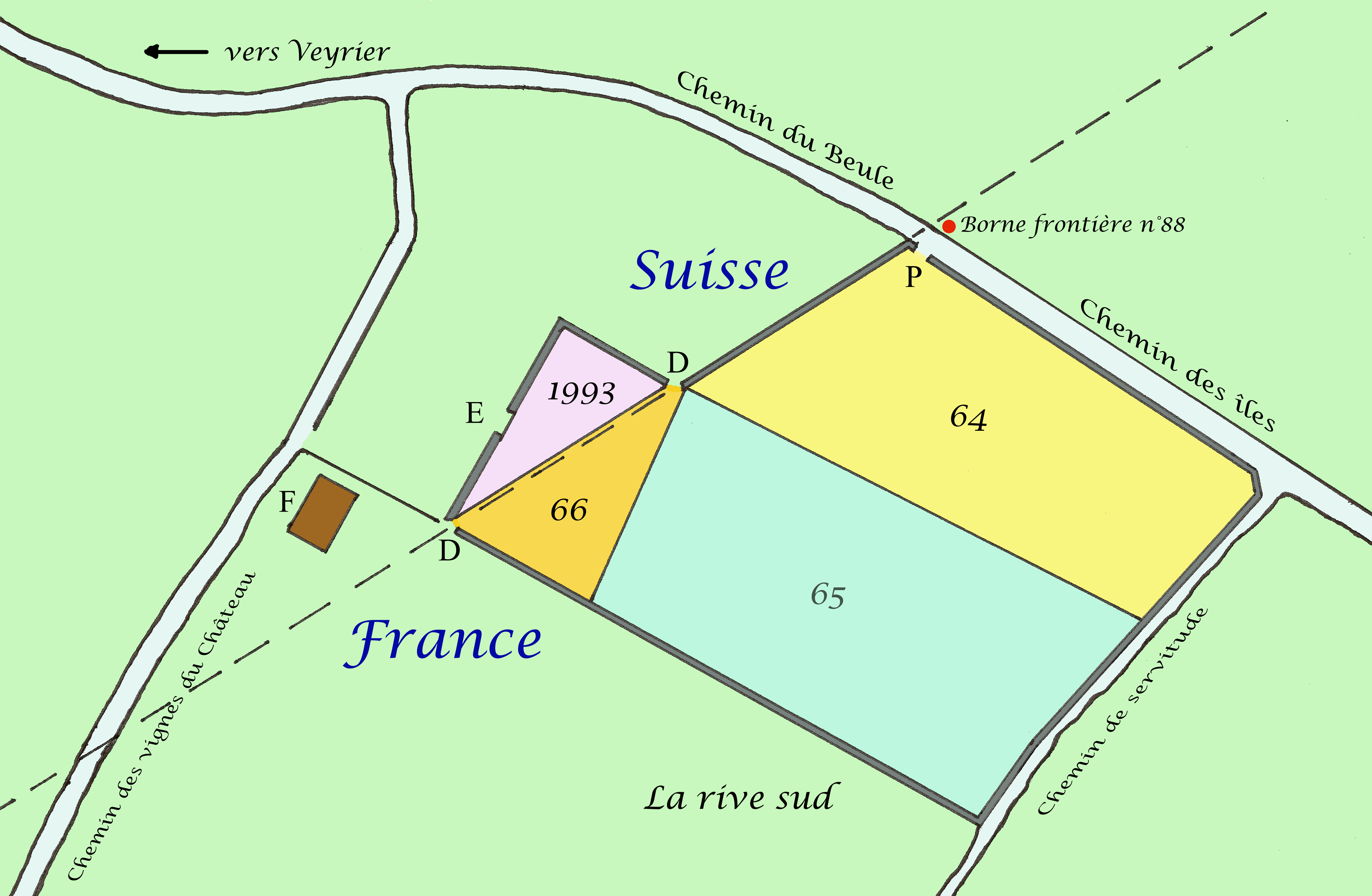 Plan du cimetière israélite de Veyrier, année 1920, avec vue sur les différentes parcelles acquises entre la France et la Suisse. A noter la présence de deux ouvertures sur le mur d'enceinte le long de la frontière (repères D) constituant la zone de libre passage des douaniers.